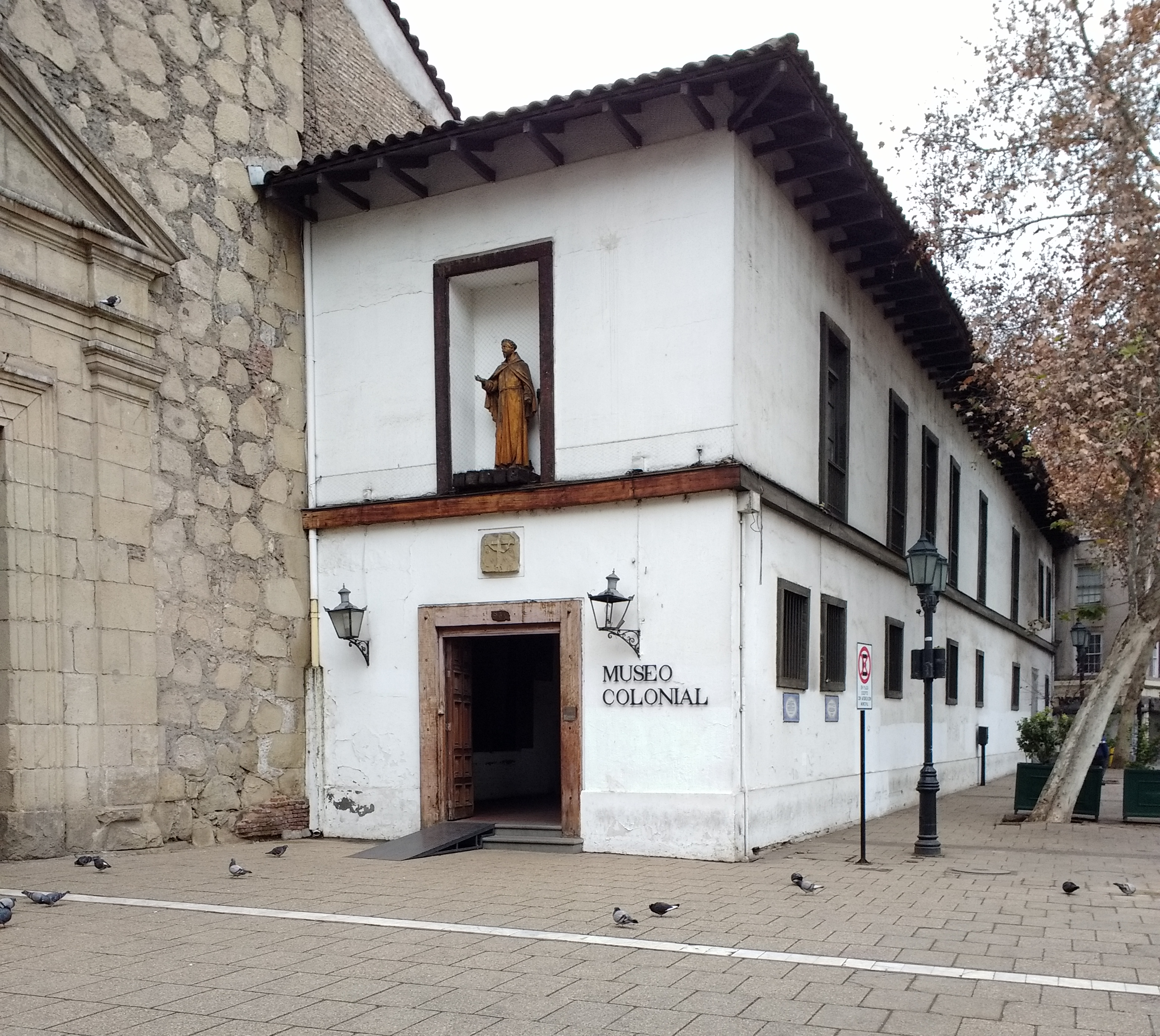 Museo Colonial - Santiago de Chile - exterior